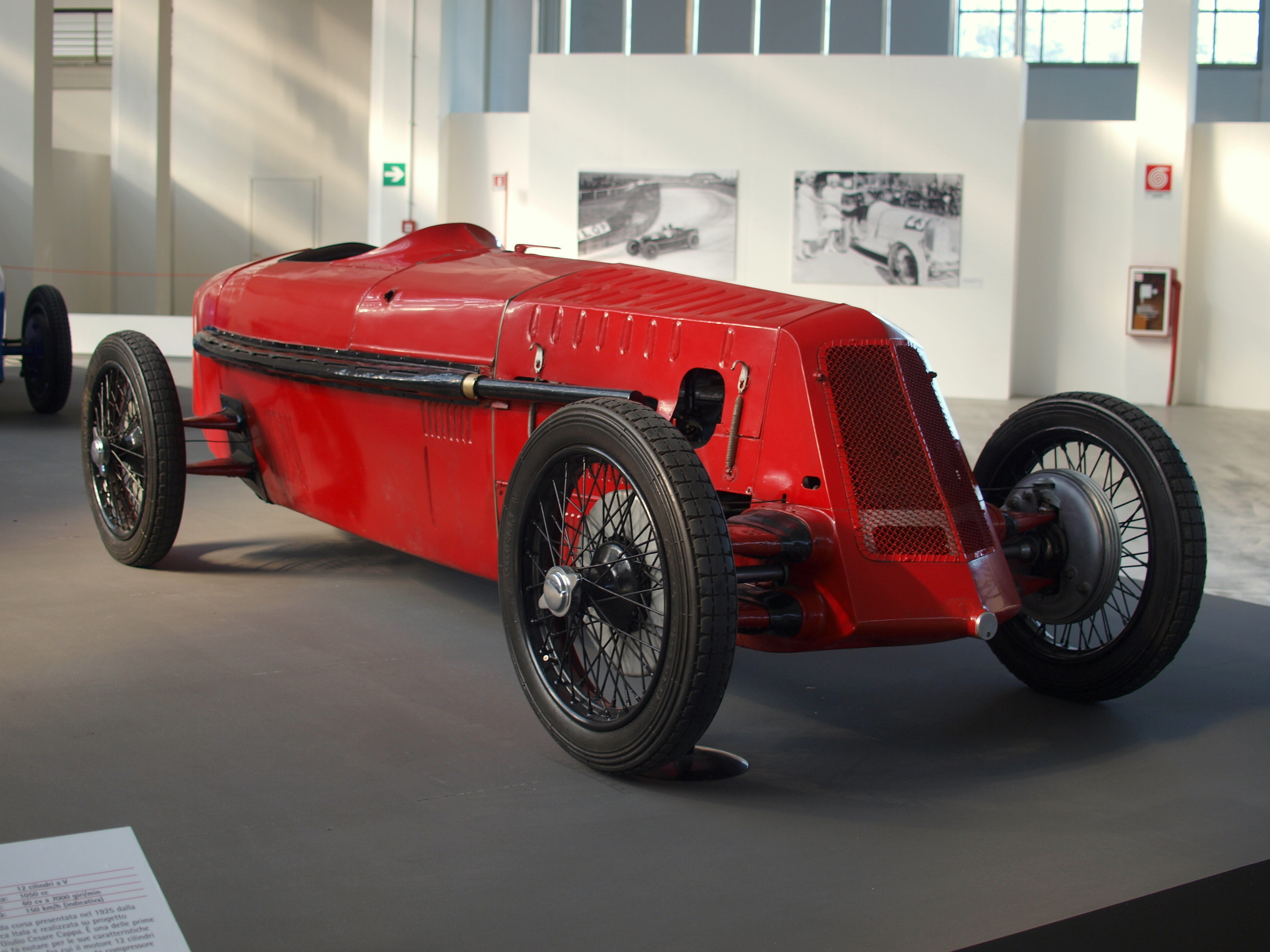 1925 Itala II V12 1050 cc L'evoluzione dell'automobile